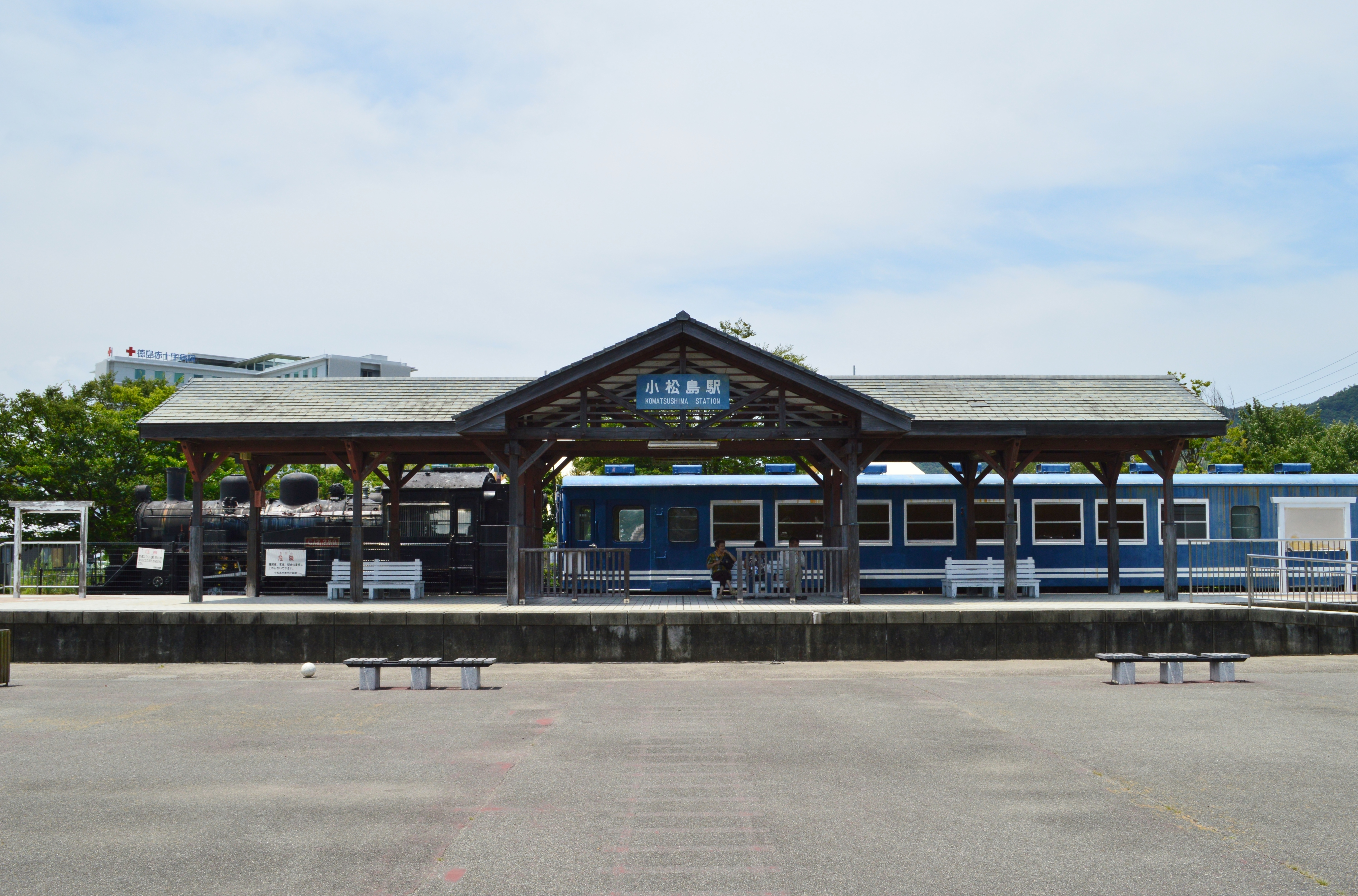 小松島ステーションパーク 正面